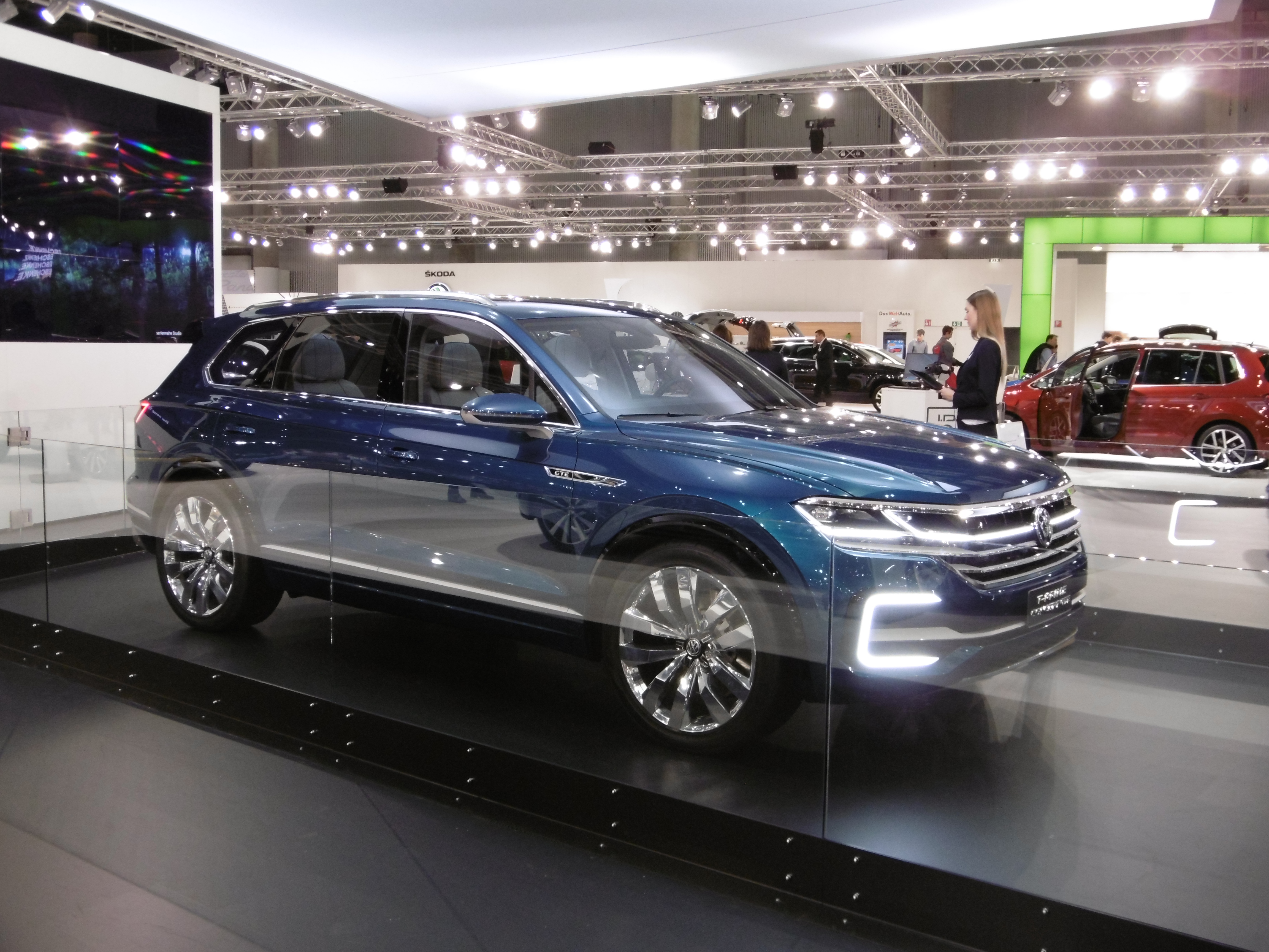 VW T-Prime Concept GTE auf der Vienna Autoshow 2018